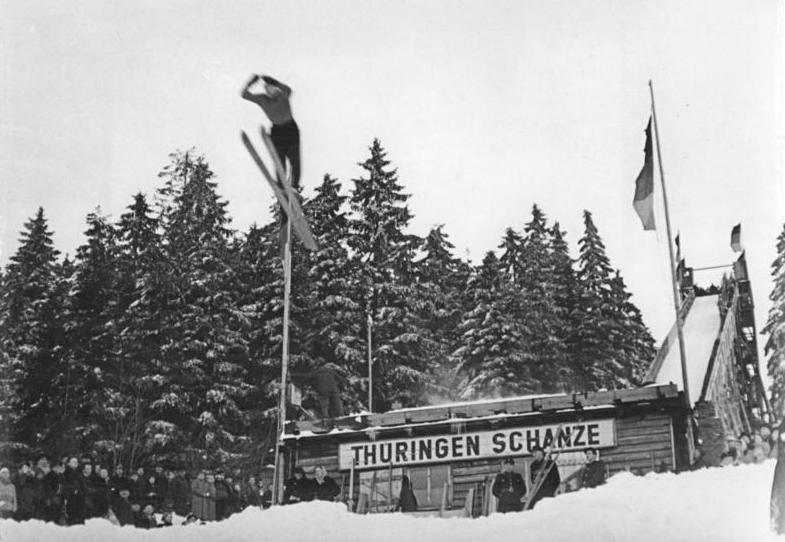 Zentralbild Quasch. 12.2.1953 IV. Wintersportmeisterschaften der Deutschen Demokratischen Republik für Frieden, Einheit, Demokratie und Sozialismus vom 10. - 15.2.1953 in Oberhof Pflichtspringen zum Sondersprunglauf auf der Thüringen-Schanze UBz: Erich Möser (DDR).